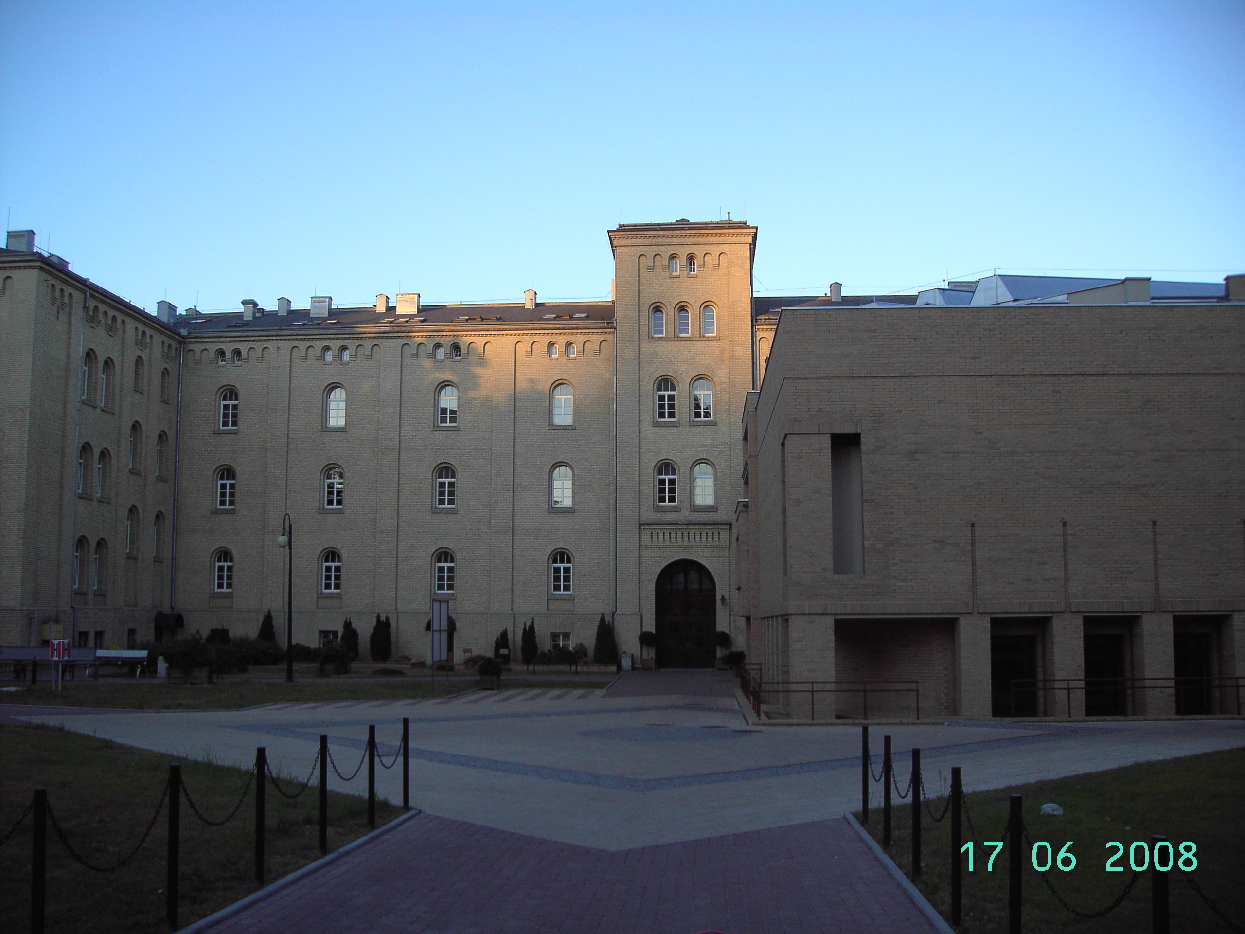 Akademia Muzyczna im. Stanisława Moniuszki w Gdańsku. / Dawne koszary.